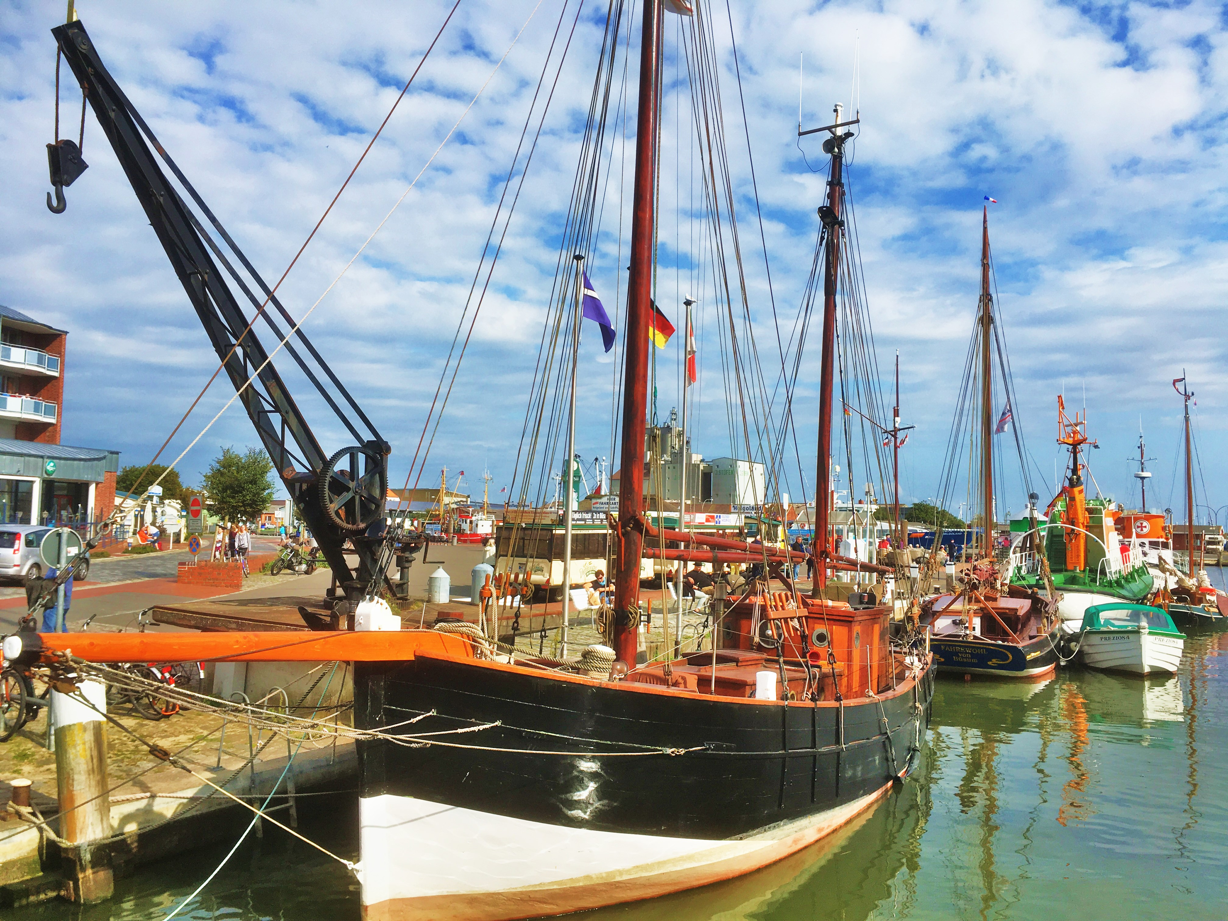 Museumshafen Büsum voller Schiffe